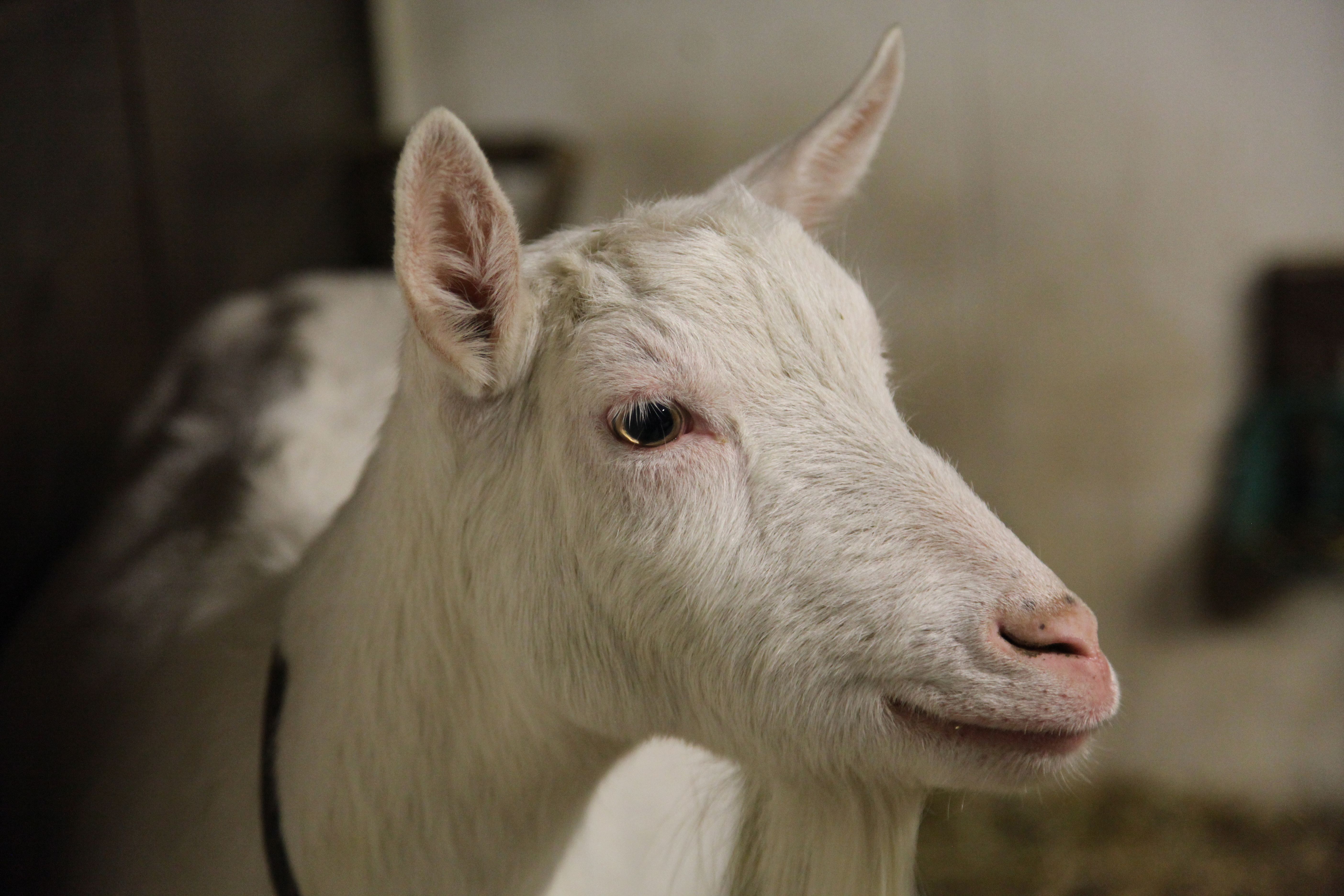 Weiße Deutsche Edelziege im Zoo in Dortmund